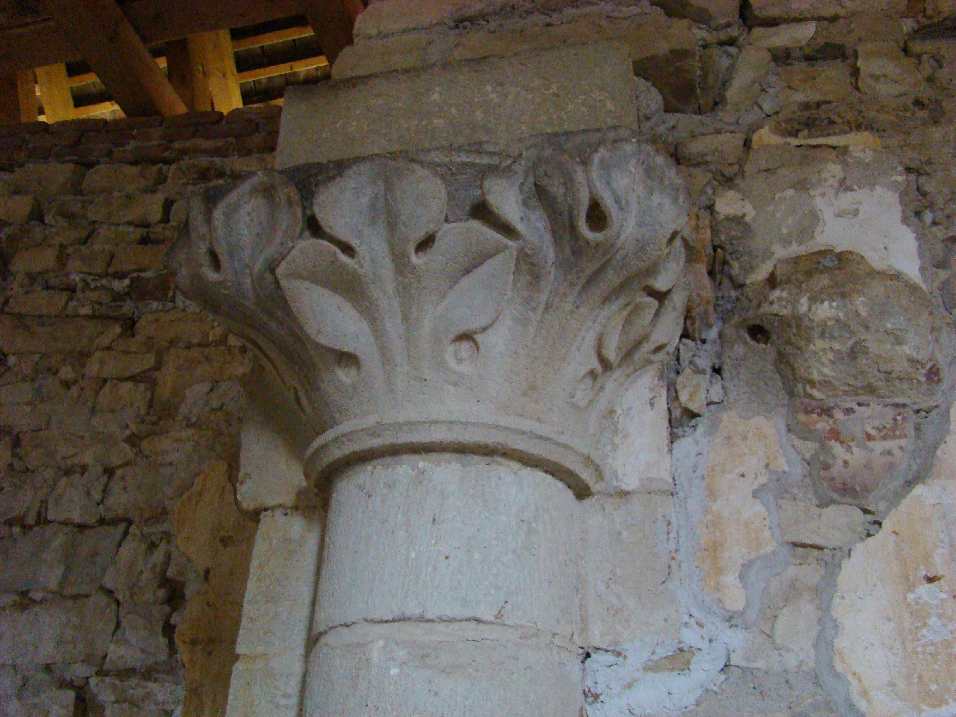 Biserica reformată, sat Nima; comuna Mintiu Gherlii, județul Cluj